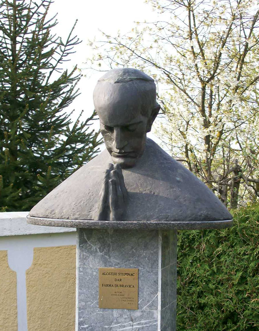 Alojzije Stepinac, bista u Rozgi kraj Zagreba, rad Ante Jurkića